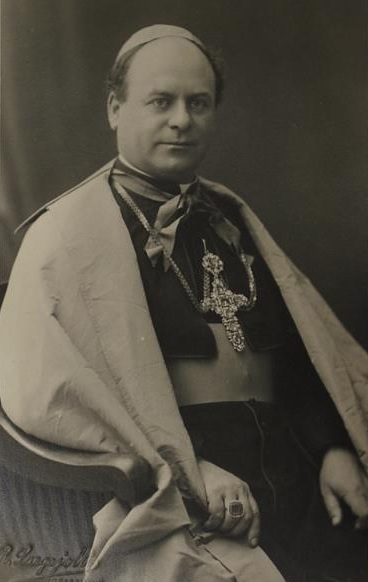 Il vescovo di Bressanone mons. Johannes Baptist Geisler